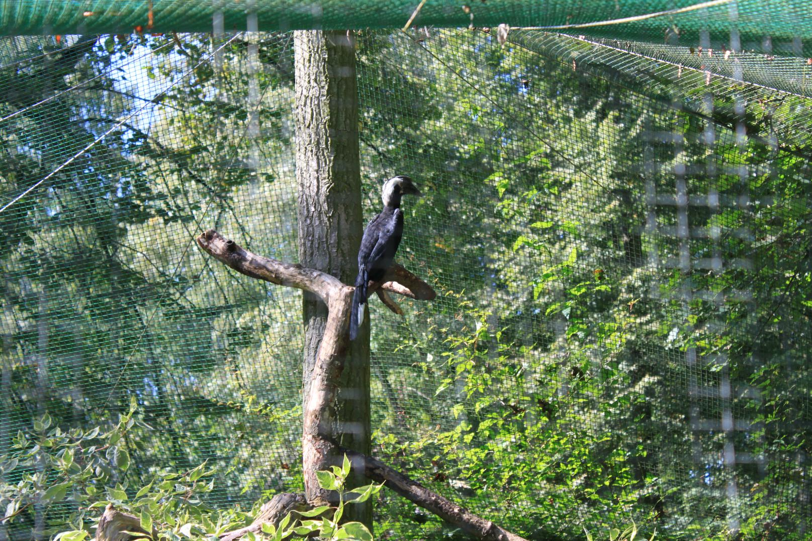 Dzioborożec białodzioby